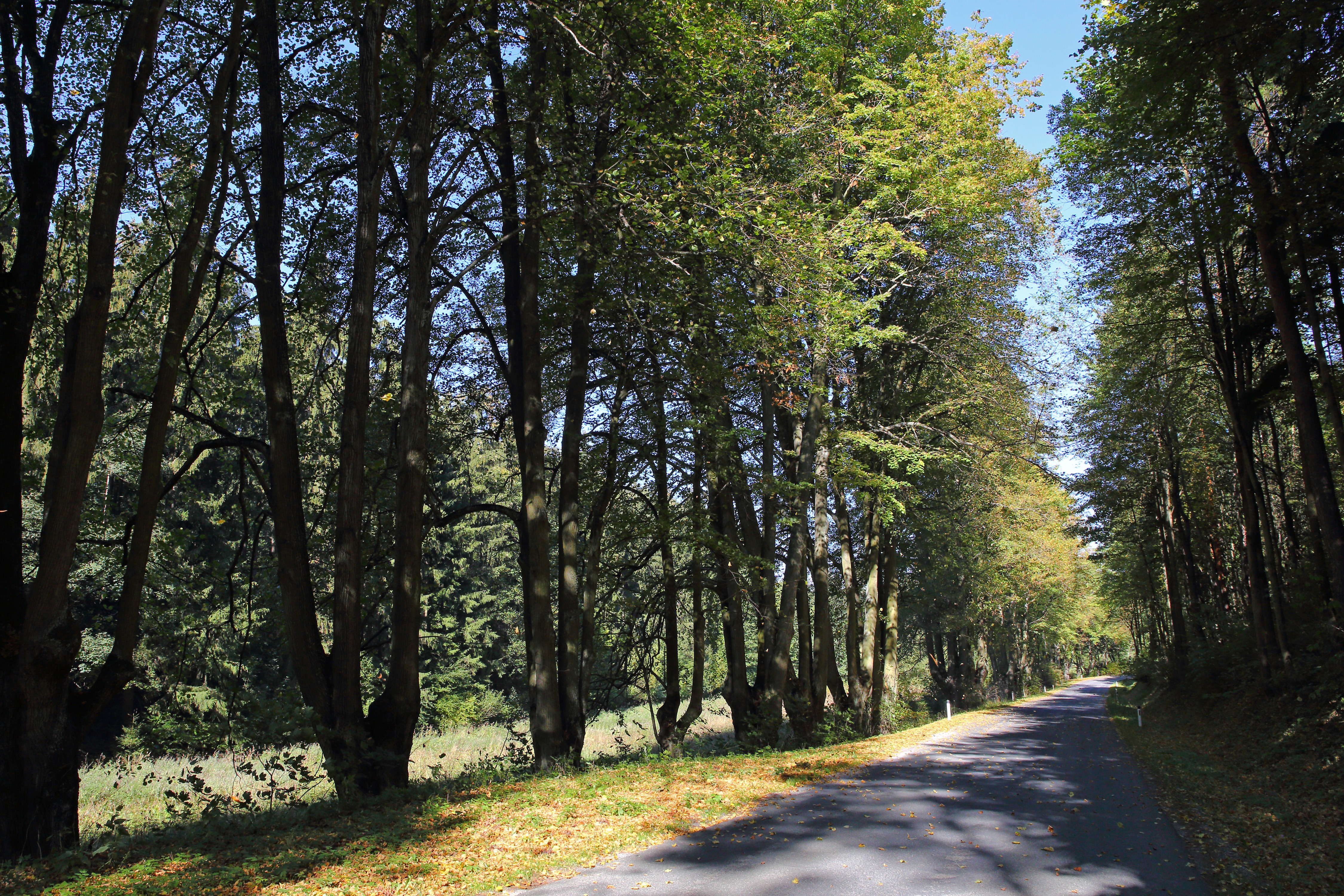 Die Allee bei Unterthumeritz, bestehend aus 35 Kandelaberlinden, wurde 1958 zum Naturdenkmal erklärt. This media shows the natural monument in Lower Austria with the ID HO-060.